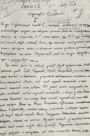 Autograph Chekhov's story "Ionich" 1898